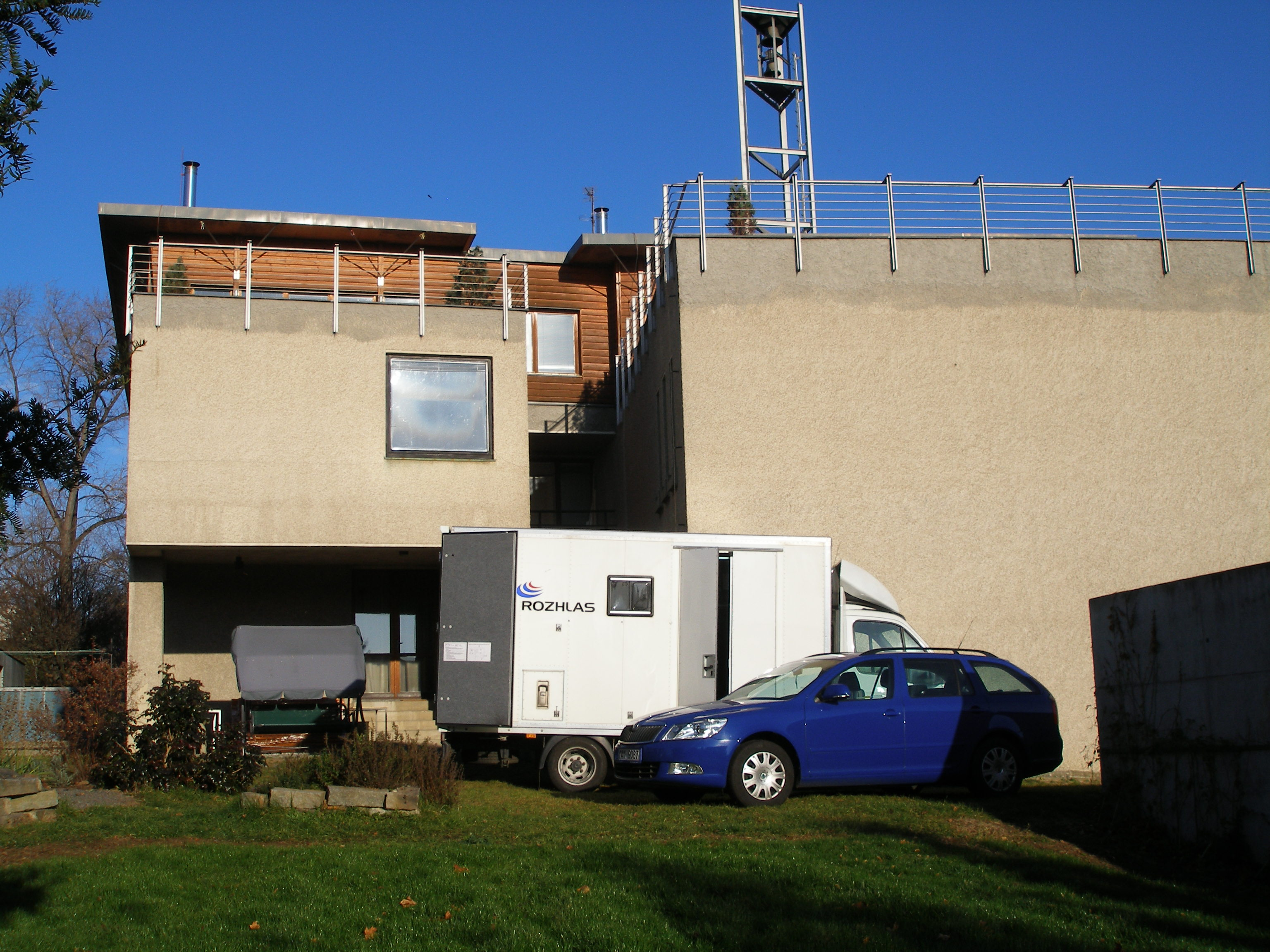 Přenosový vůz Českého rozhlasu na zahradě kostela U Jákobova žebříku během přímého přenosu bohoslužeb 27. listopadu 2011 Českým rozhlasem z tohoto kostela.